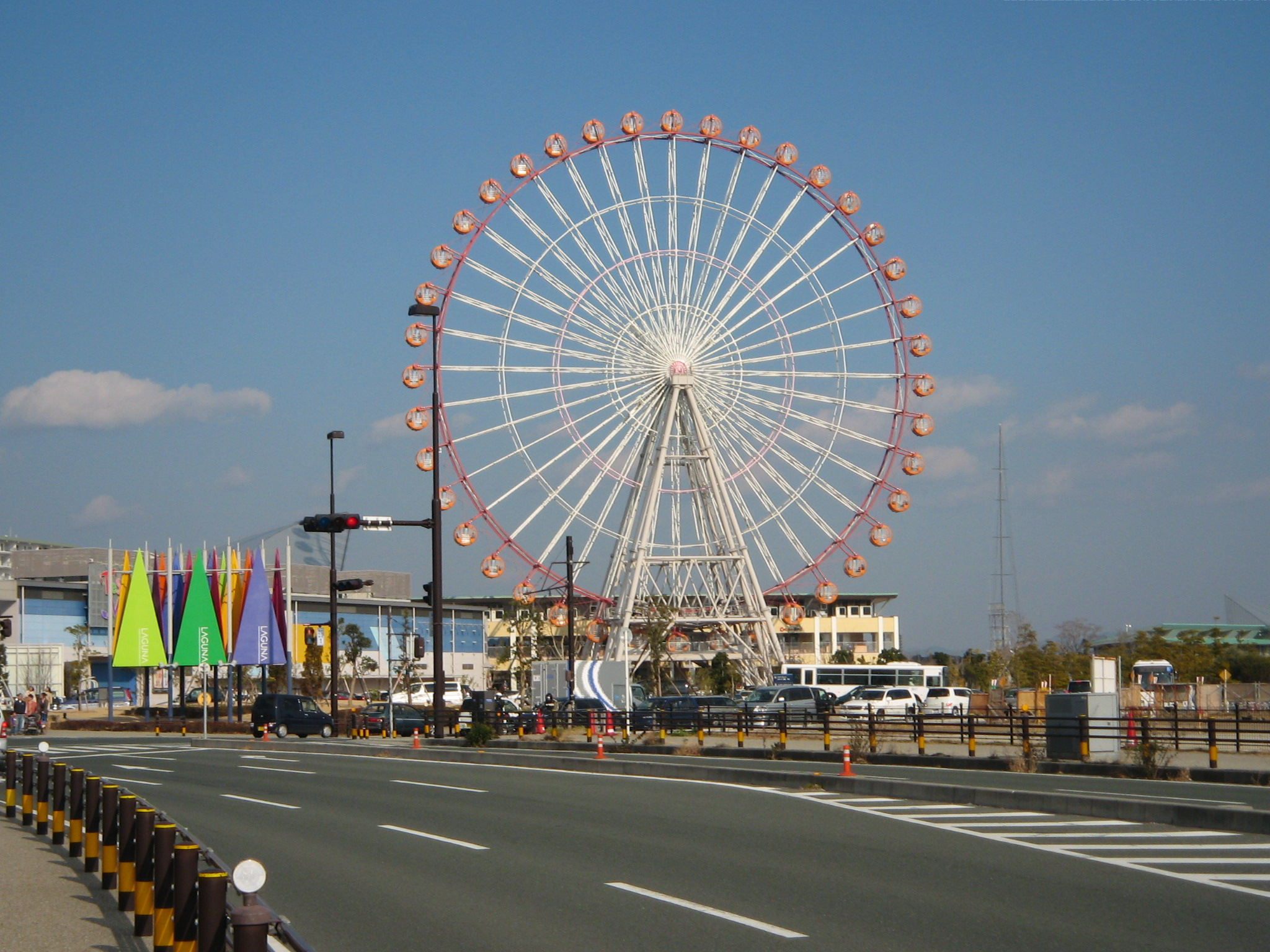 Ferres Wheel @ LAGUNA GAMAGORI